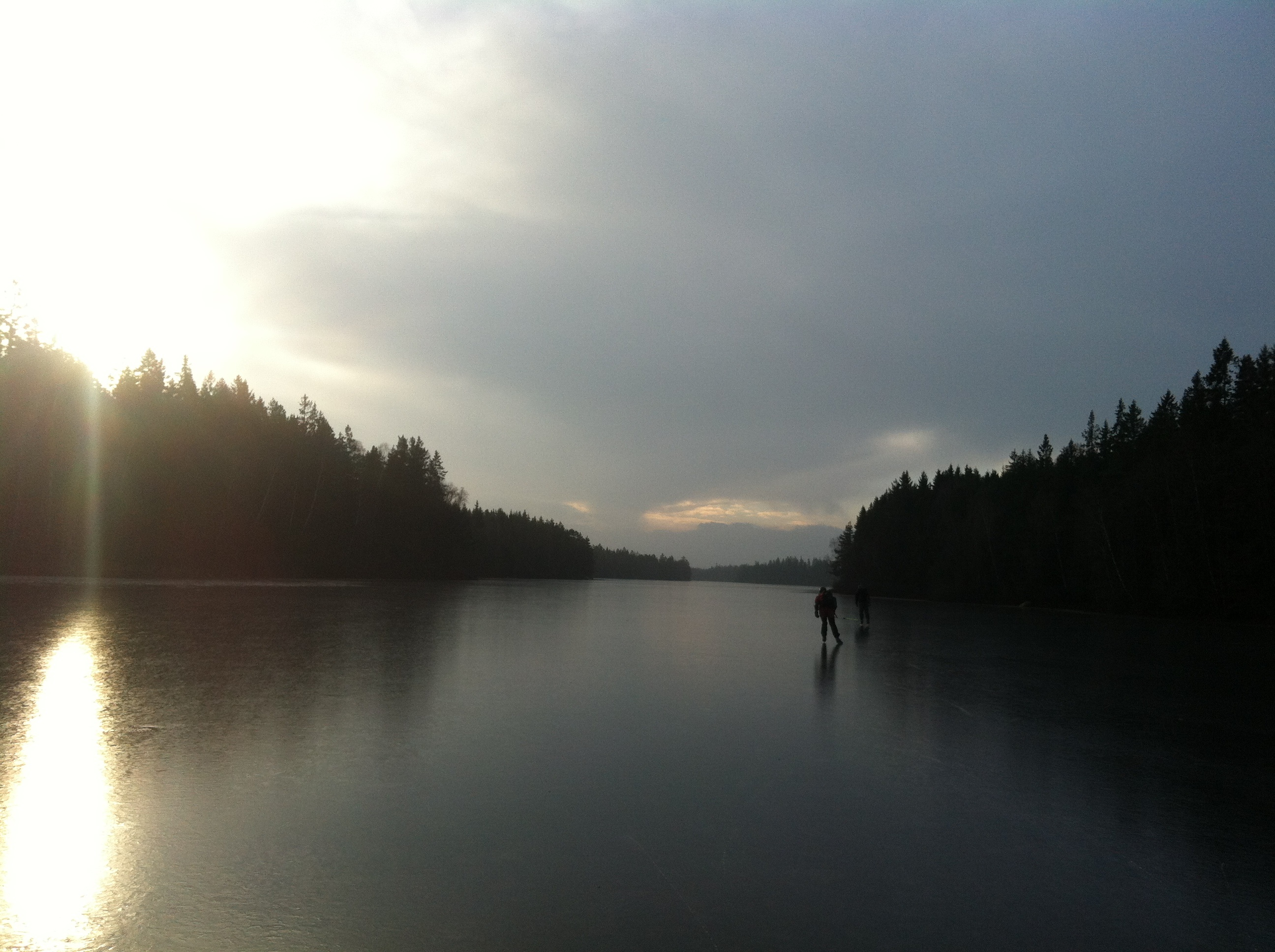 Skridskoåkning på Sidlången 2015.